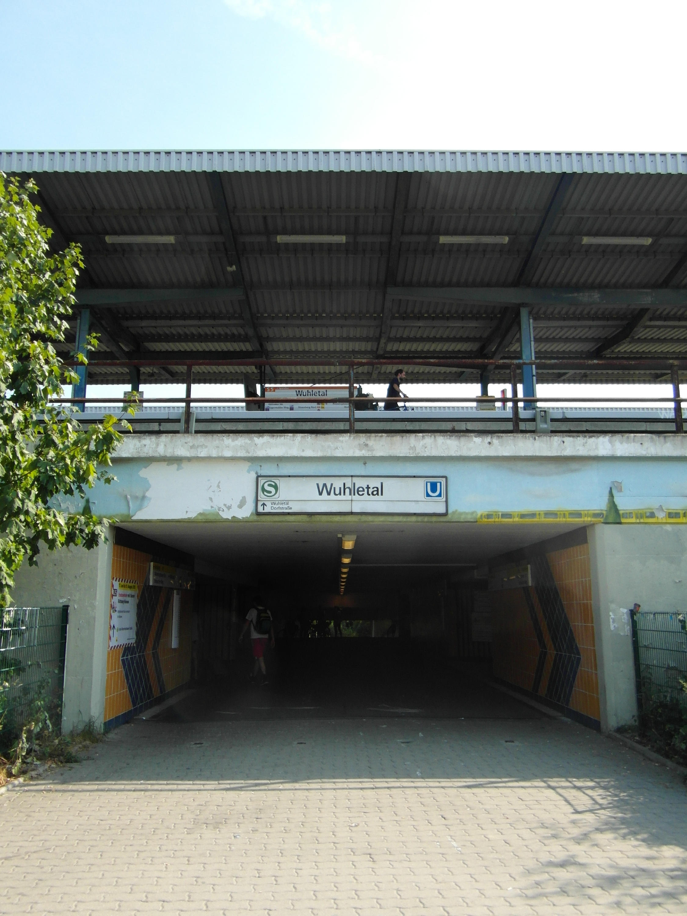 Ein gemeinsamer Bahnhof mit bahnsteiggleichem Übergang zwischen S- und U-Bahn - Linien S5 und U5